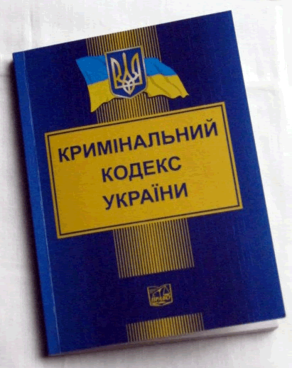 This photo shows a cover of the recent edition of the Criminal Code of Ukraine, as by January 12th 2015. На цьому фото зображено обкладинку видання "Кримінальний Кодекс України, станом на 12 січня 2015 року". Харків,"Право", 2015. - 252 с. ISBN 978-966-458-741-6